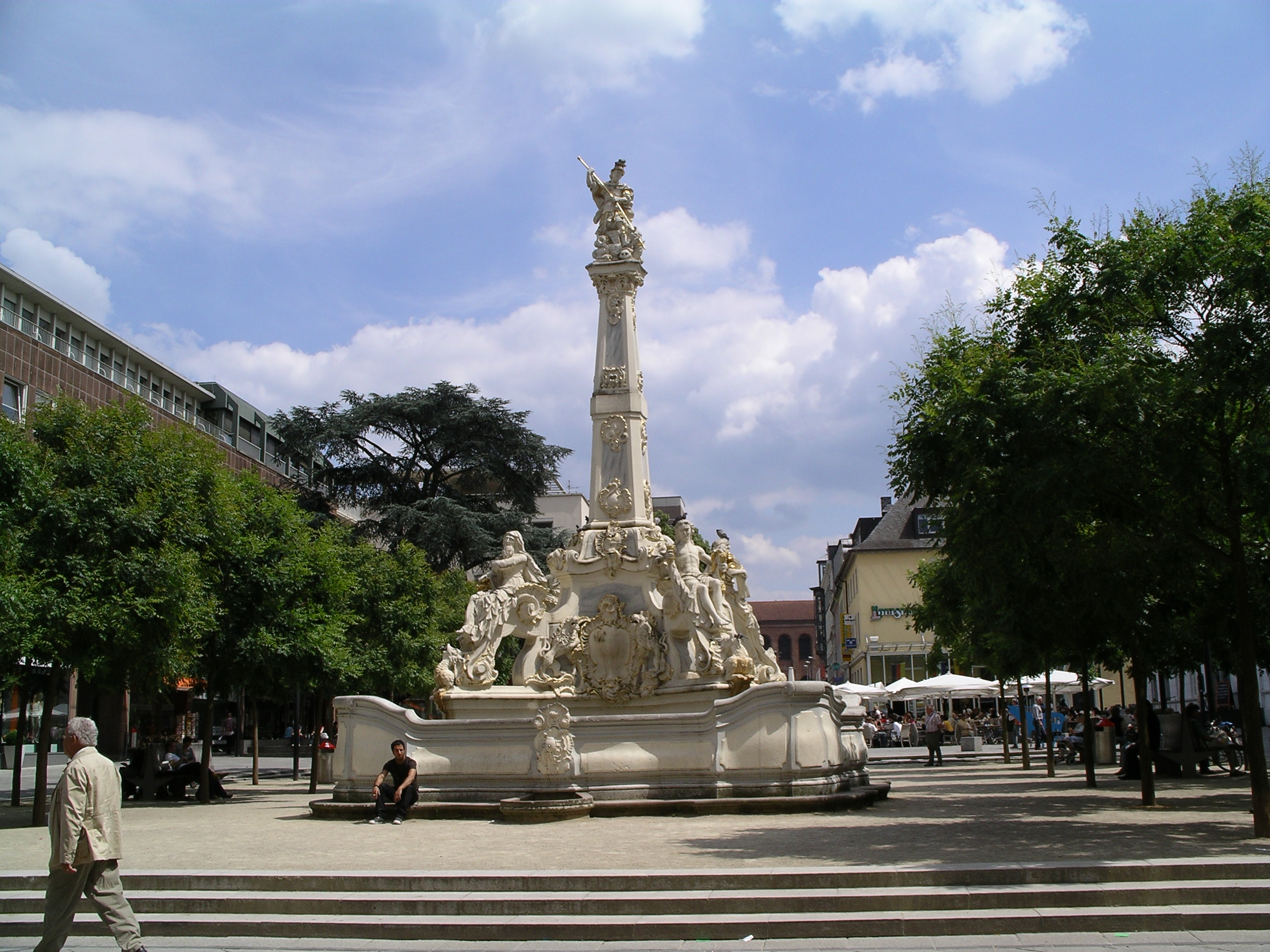 Trier, Kornmarkt (2008)